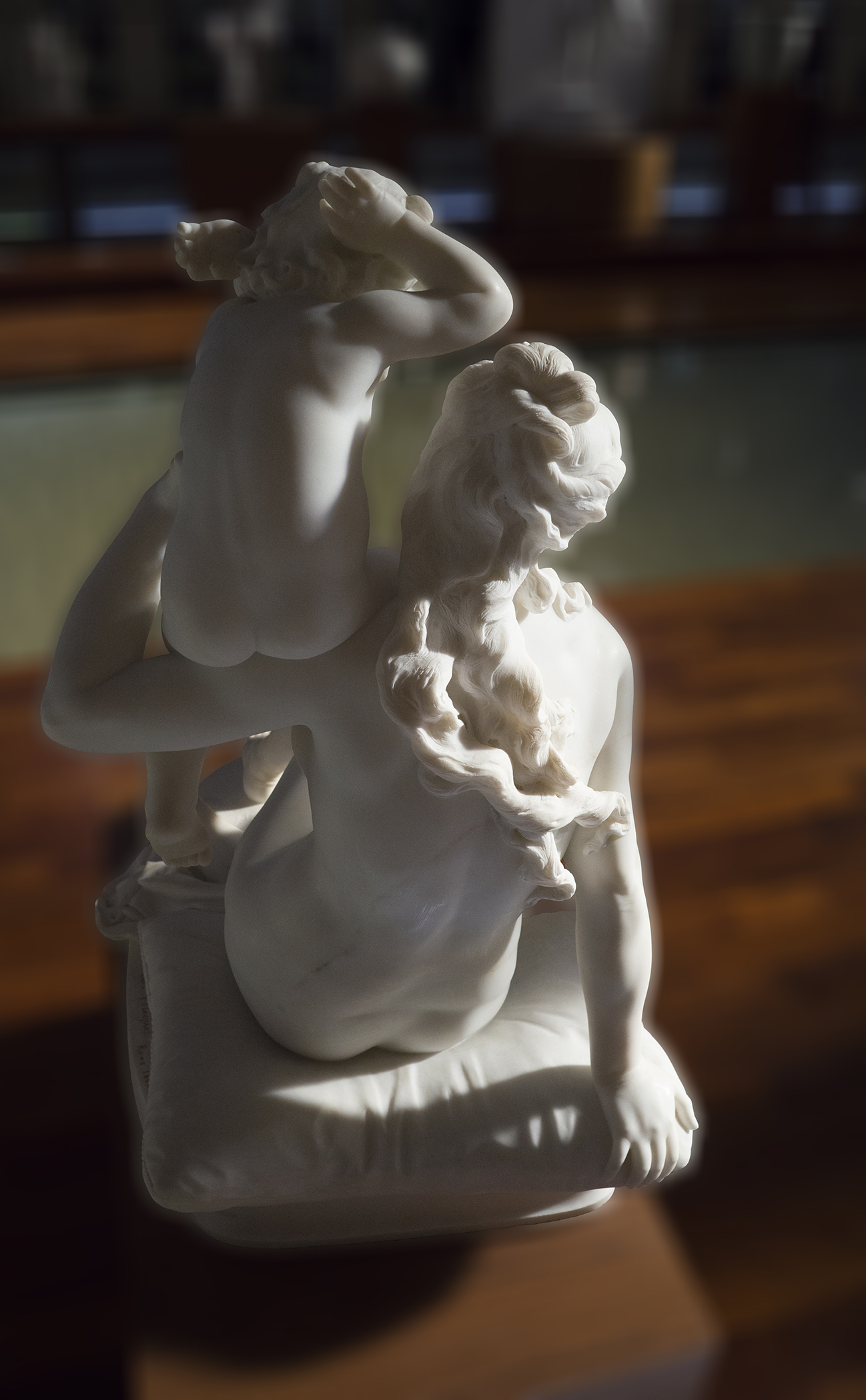 Vue de dos au soleil couchant suer la verrière ouest du musée